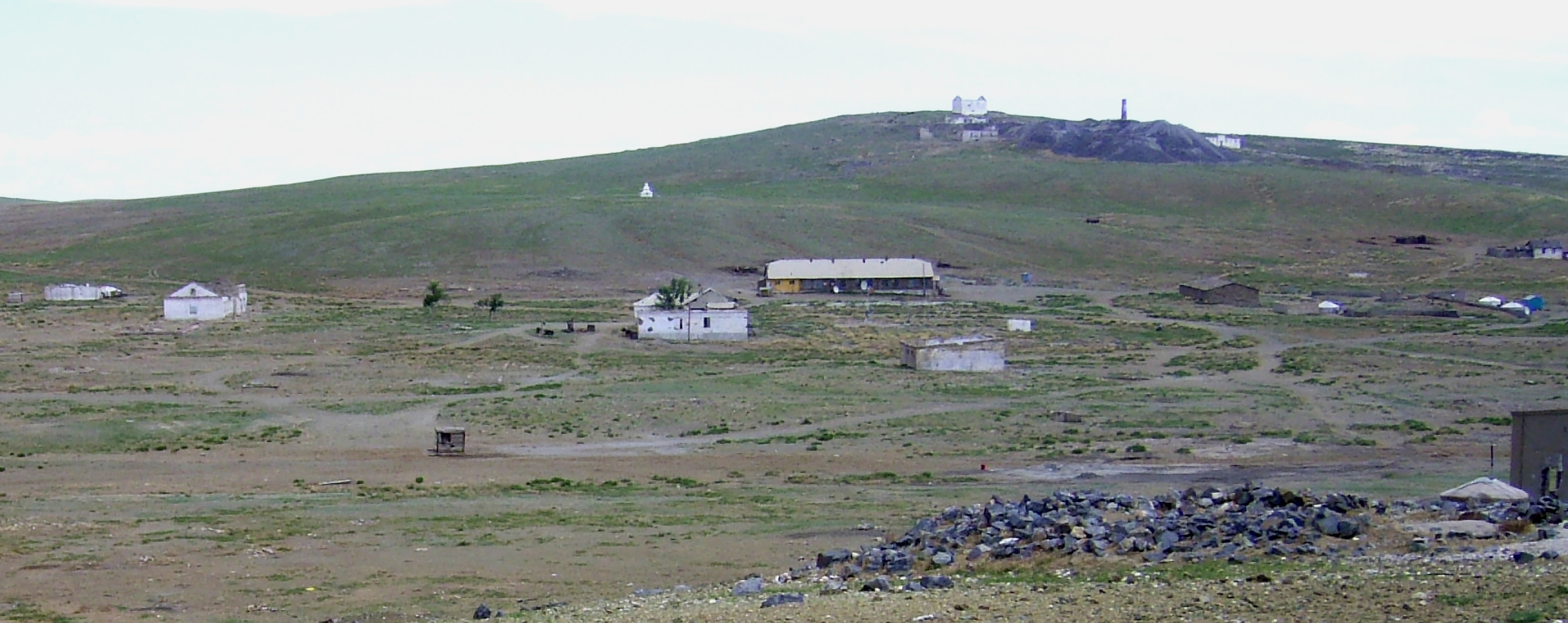 Der Ort Burenzogt 2010